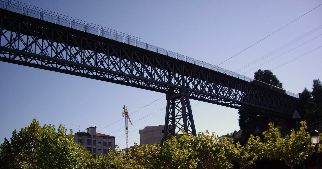 Viaduto de Pontevedra, Redondela Licensing Categoría:Imaxes de pontes de Redondela Categoría:Imaxes de Bens de Interese Cultural de Galicia